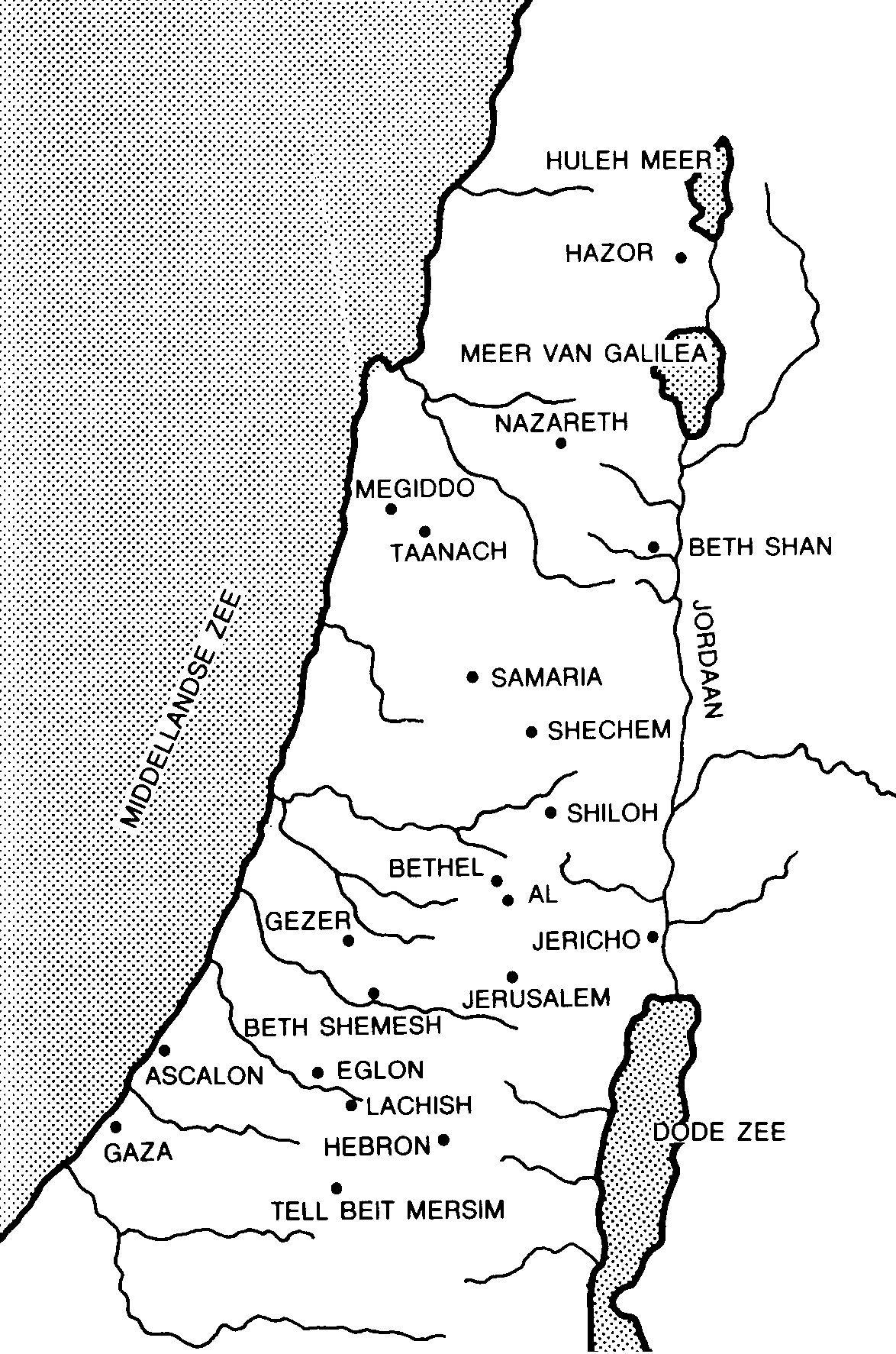 Zuid Kanaän ten tijde Oud Testament